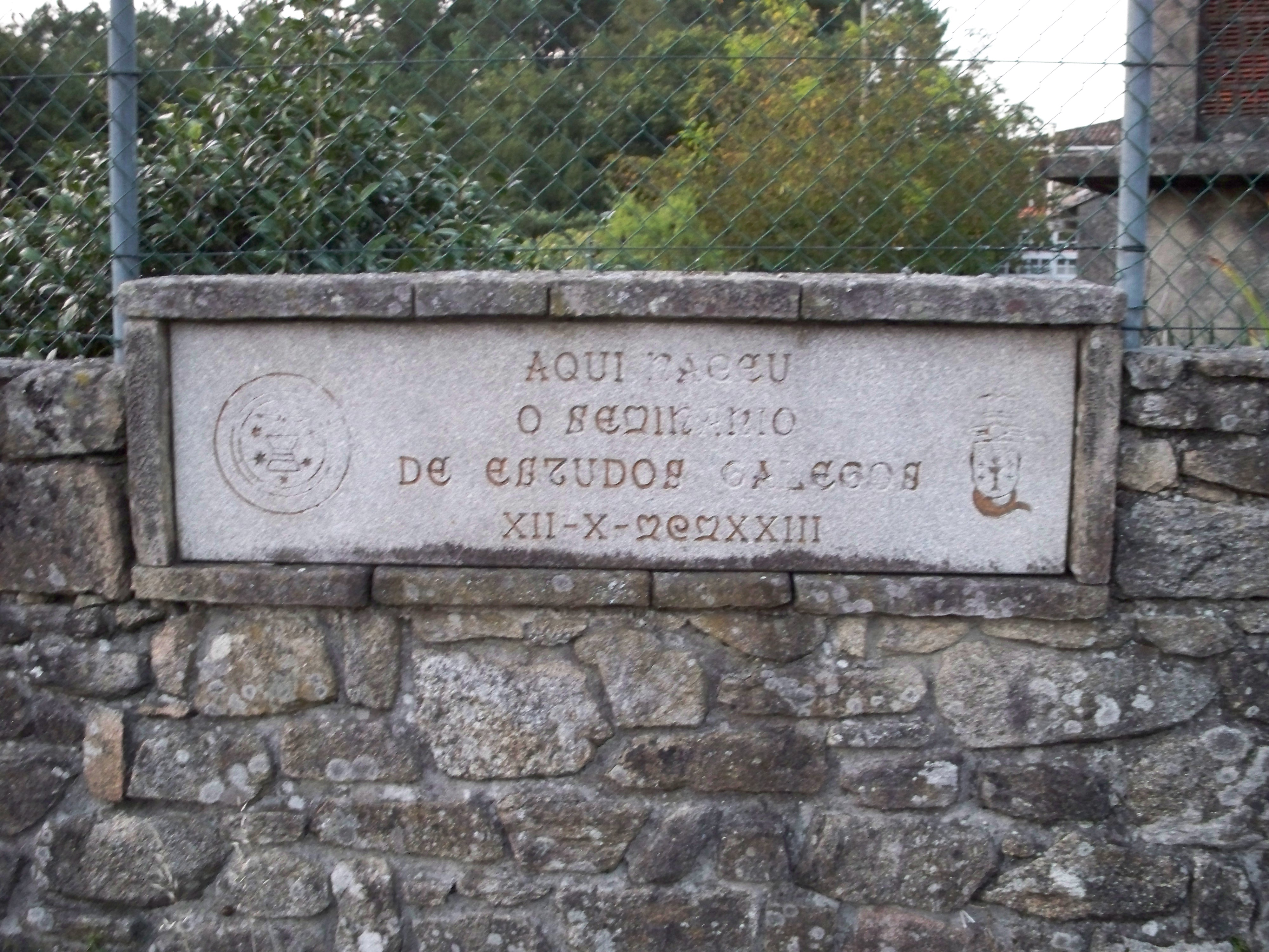 Placa conmemorativa de la fundación del Seminario de Estudos Galegos.